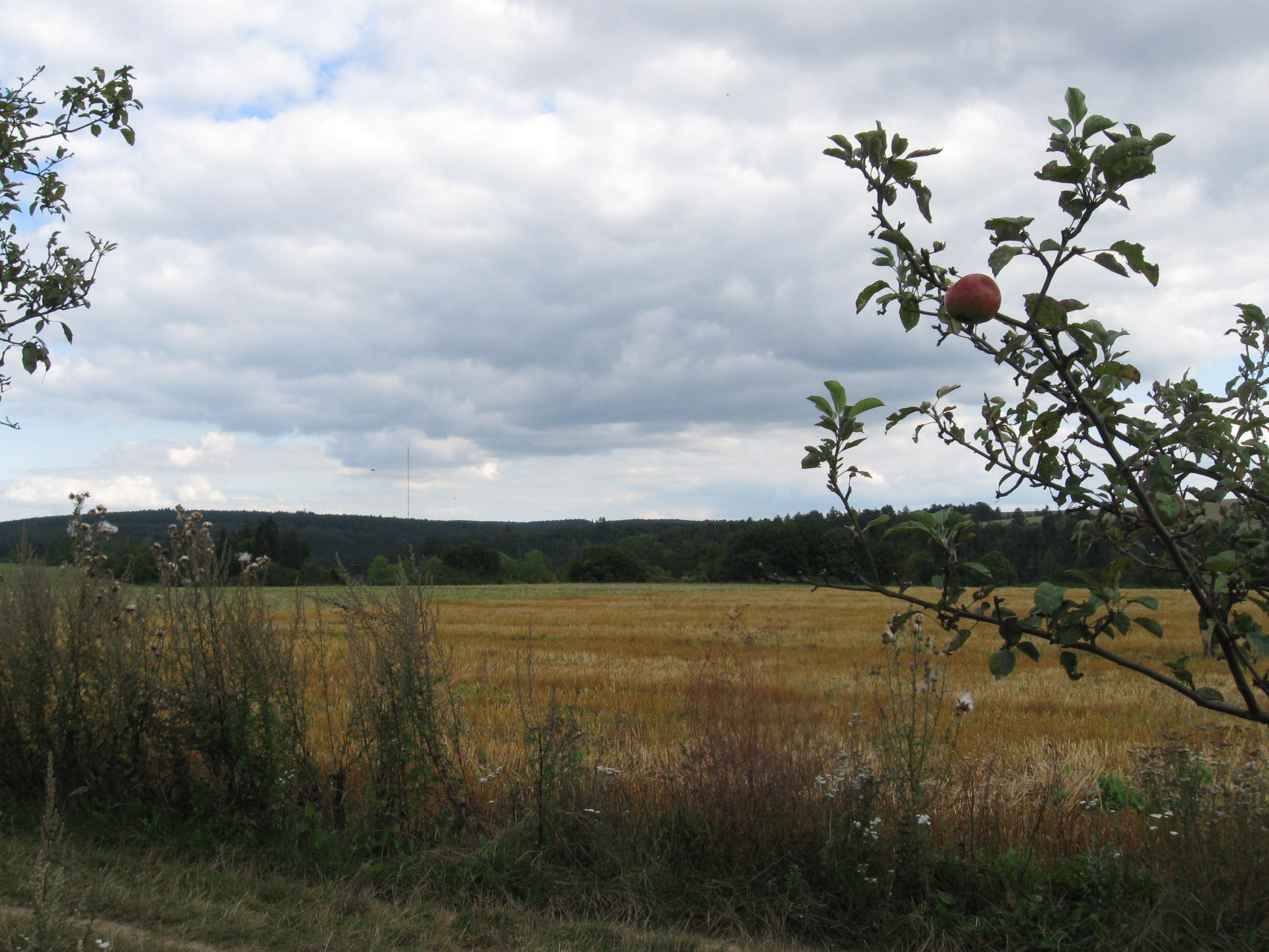 Drahanská vrchovina - foto od Ostrova u Macochy, v pozadí televizní vysílač Kojál